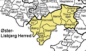 Øster Lisbjerg Herred Randers Amt, Denmark Source: Map by Svend-Erik Christiansen